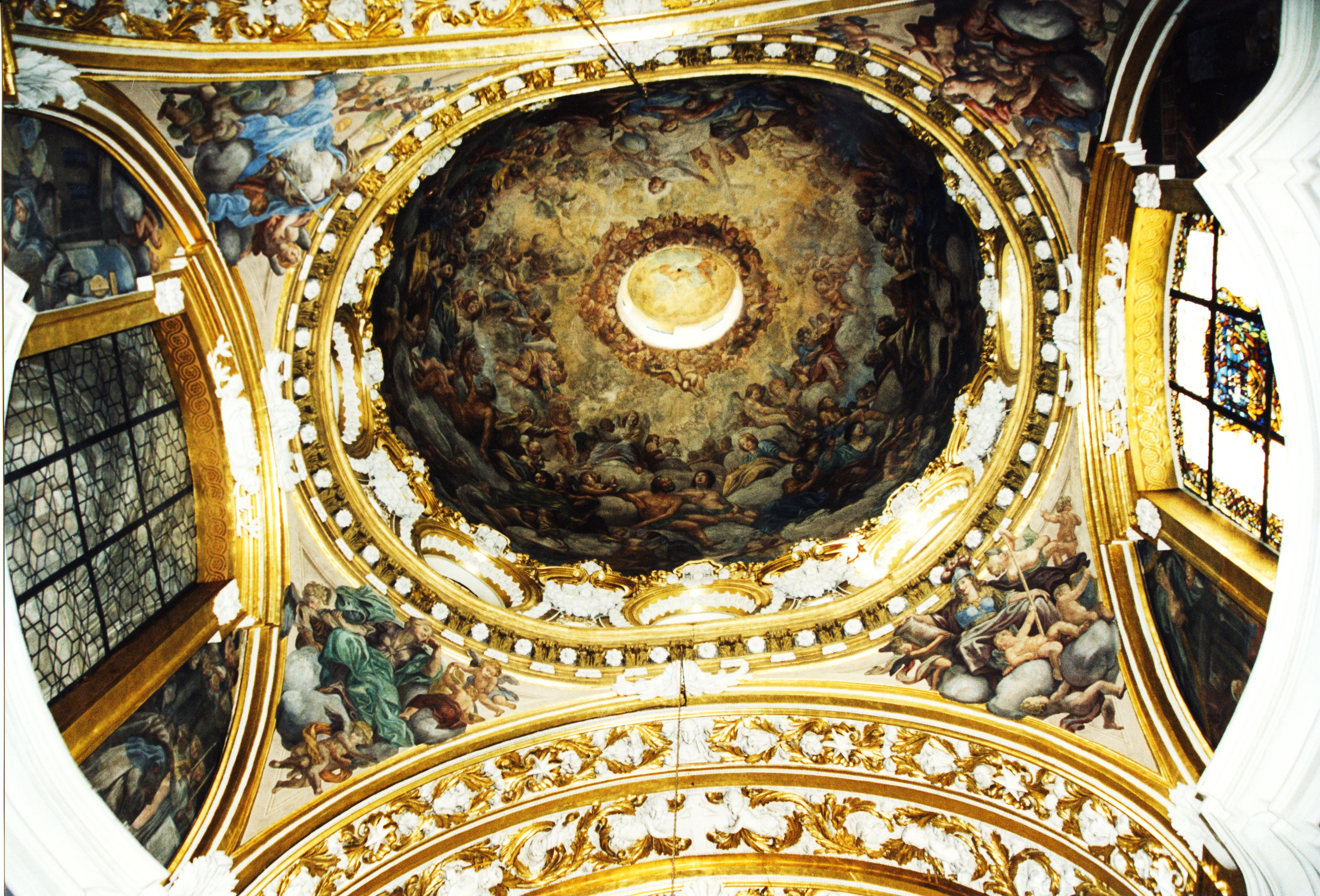 wnętrze archikatedry wrocławskiej